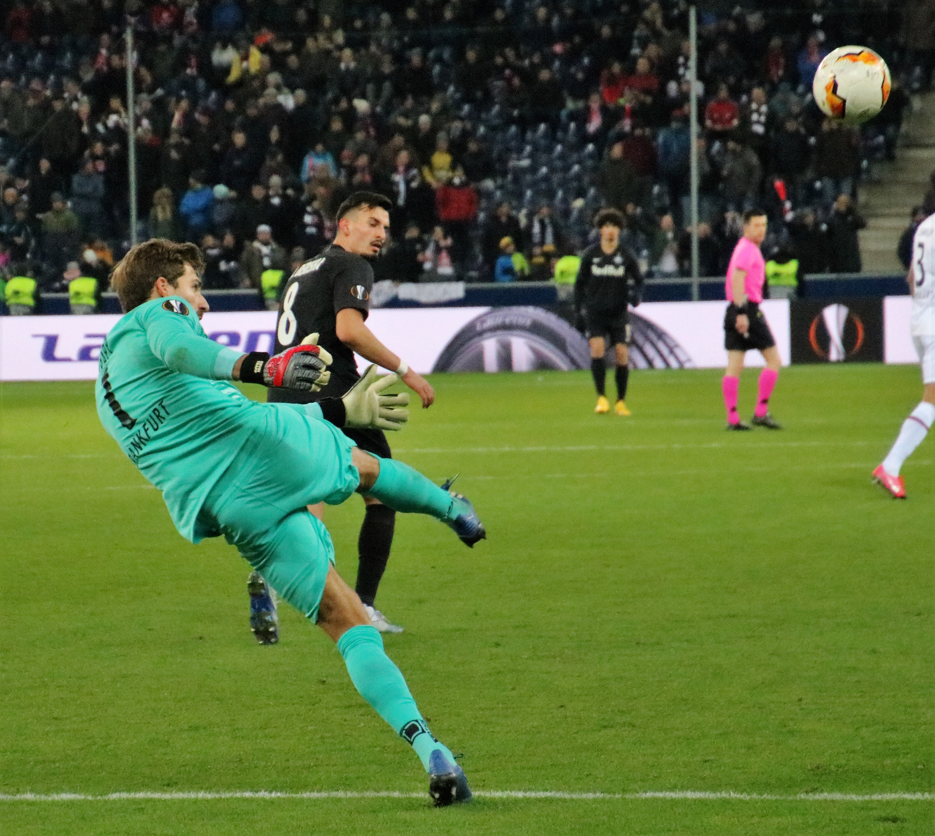 EL Sechzehntelfinale Rückspiel 2:2